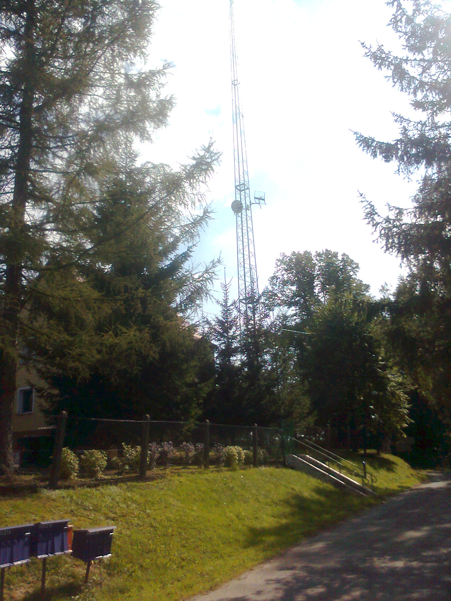 Jasienica Górna, budynek byłej Strażnica Wojsk Ochrony Pogranicza Jasienica Górna (WOP), od 16 maja 1991 roku Strażnica Straży Granicznej w Jasienicy Górnej (SG), a od 24 sierpnia 2005 roku placówka Straży Granicznej, do 14 czerwca 2006 roku — maszt radiotelefonu stacjonarnego. Obecnie budynek mieszkalny